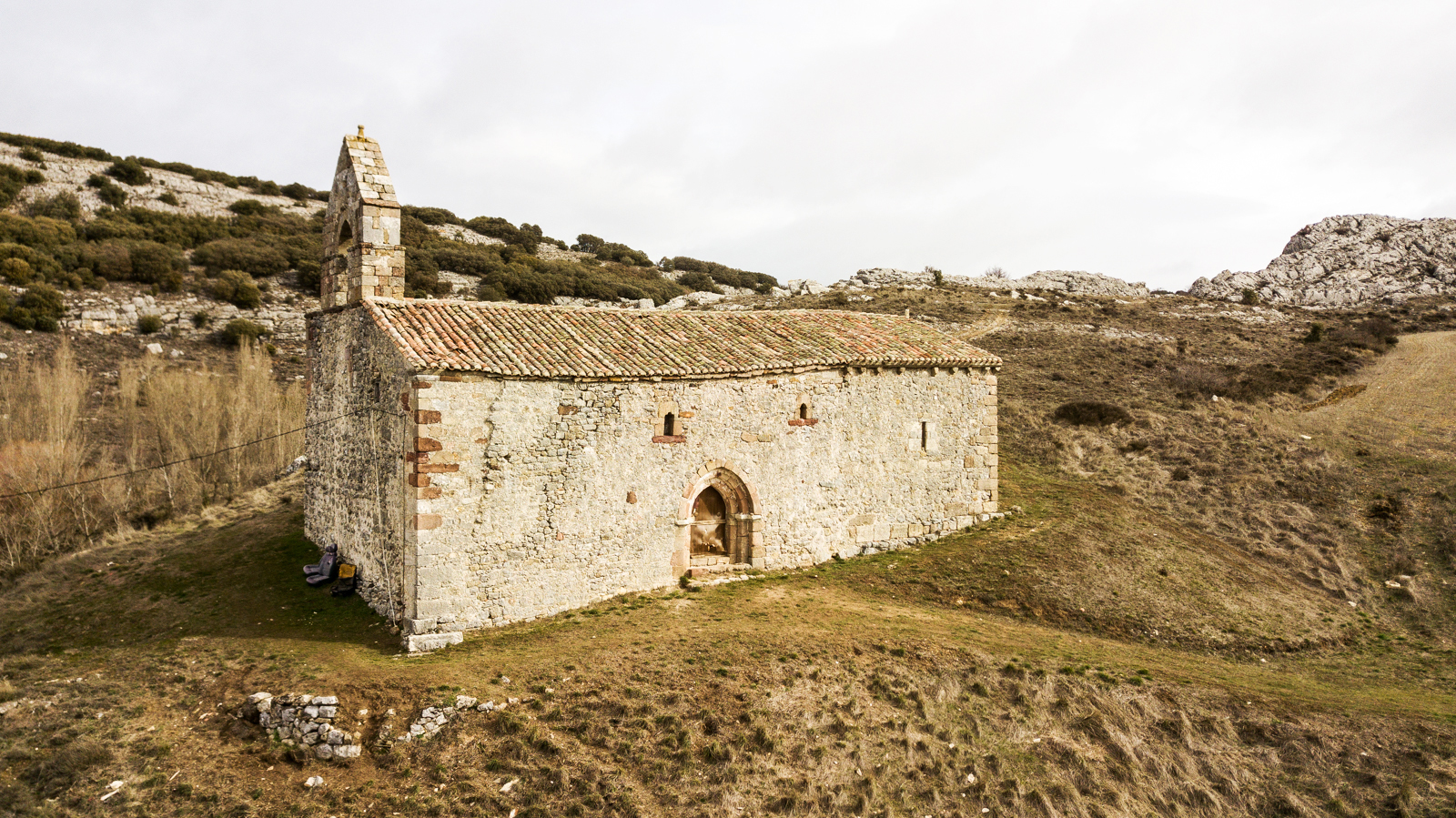 Ermita de Nuestra Señora de Camporredondo (Cuevas de Amaya, España), en las estribaciones de Las Loras.